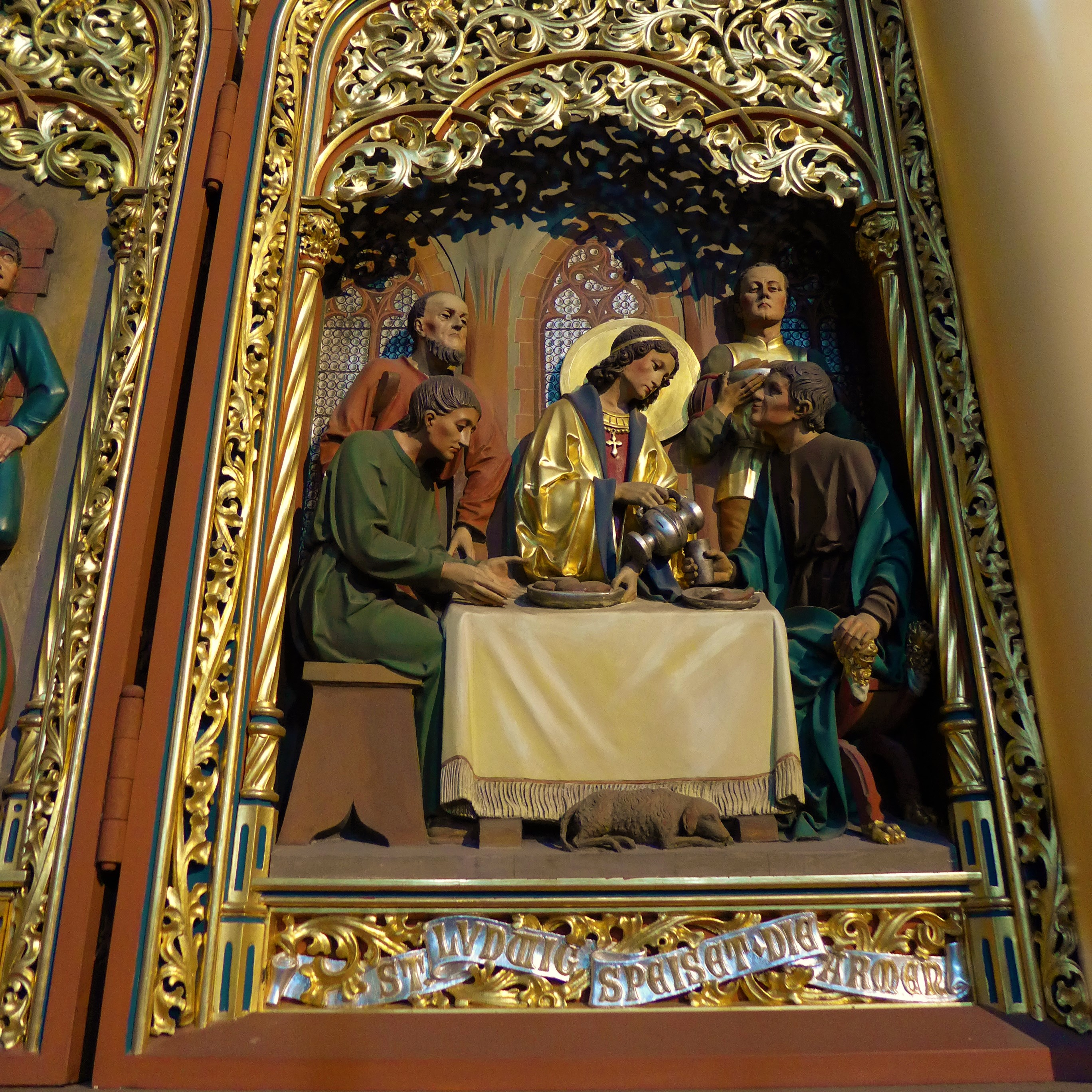 St. Ludwig (Saarlouis), Neogotischer Flügelaltar, Flügelrelief "St. Ludwig speiset die Armen"